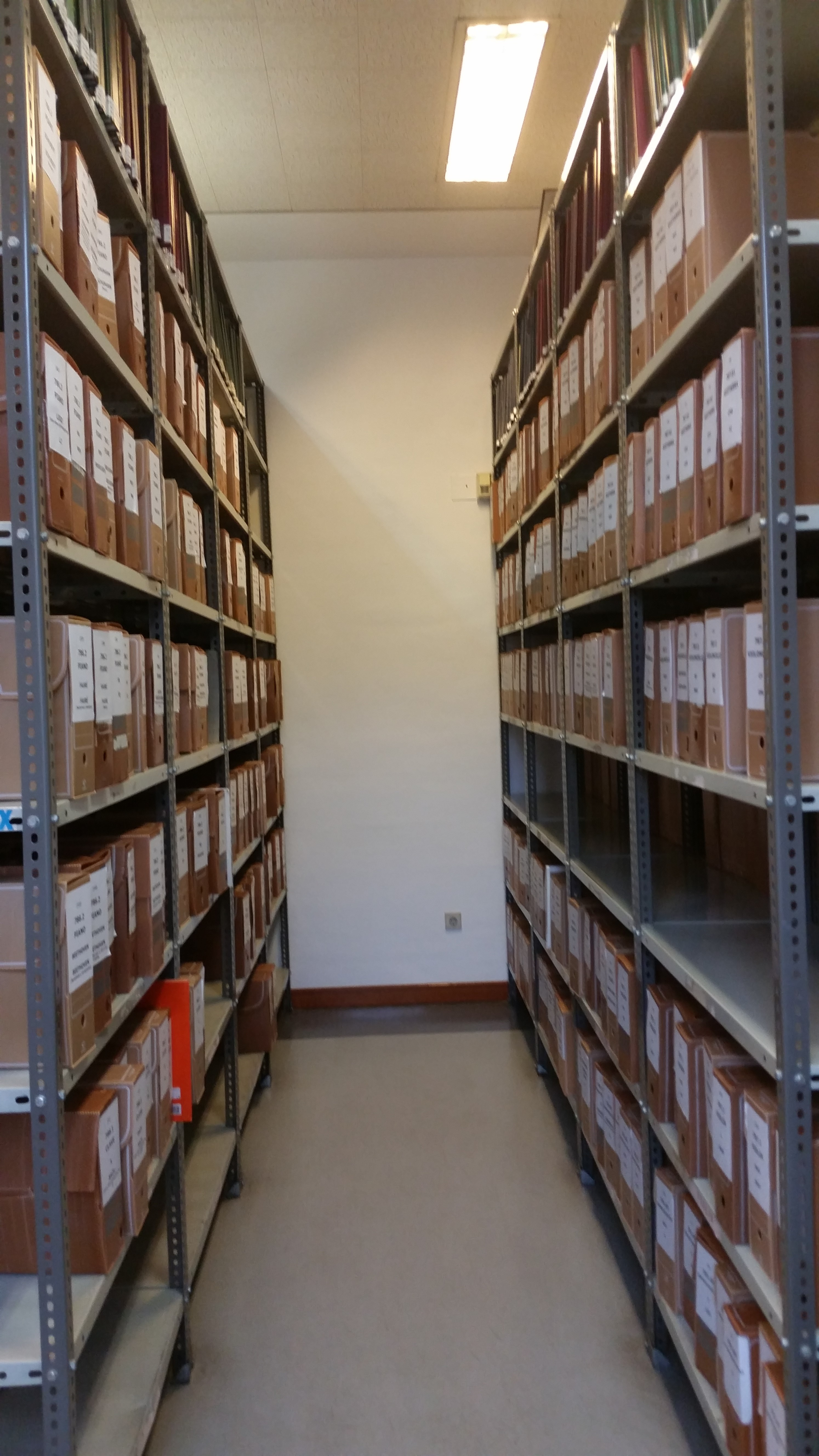 Depósito de la Biblioteca del Conservatorio Superior de Música Eduardo Martínez Torner en Oviedo (Asturias).